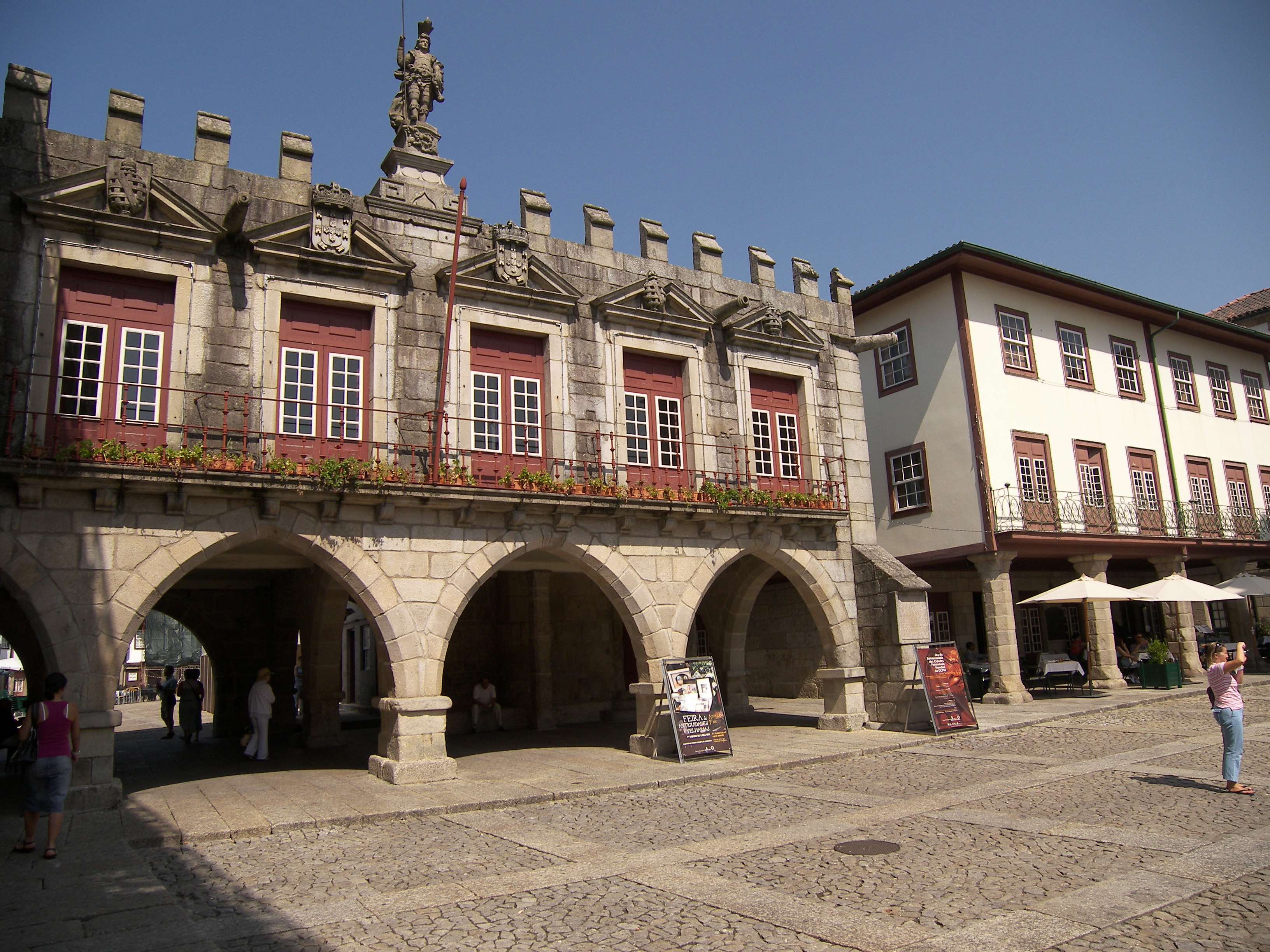 Guimarães-Altstadt-Rathaus